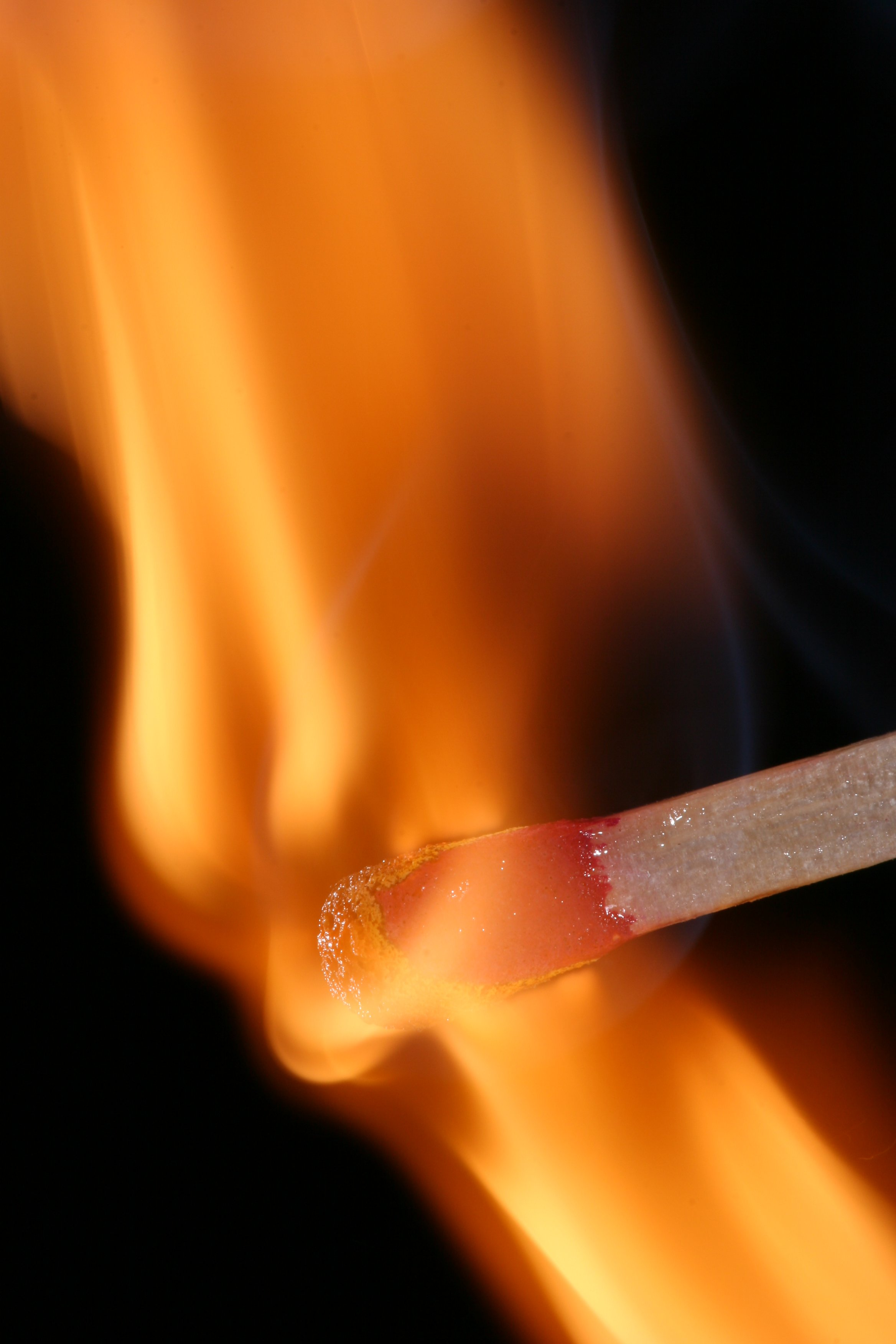 Streichholz beim Zünden Original date Resolution3504 x 2336 Focal length150.0mm (Sigma 150mm 2,8 Makro) Exposure time1/125s Aperture16.0 Camera modelCanon EOS 20D